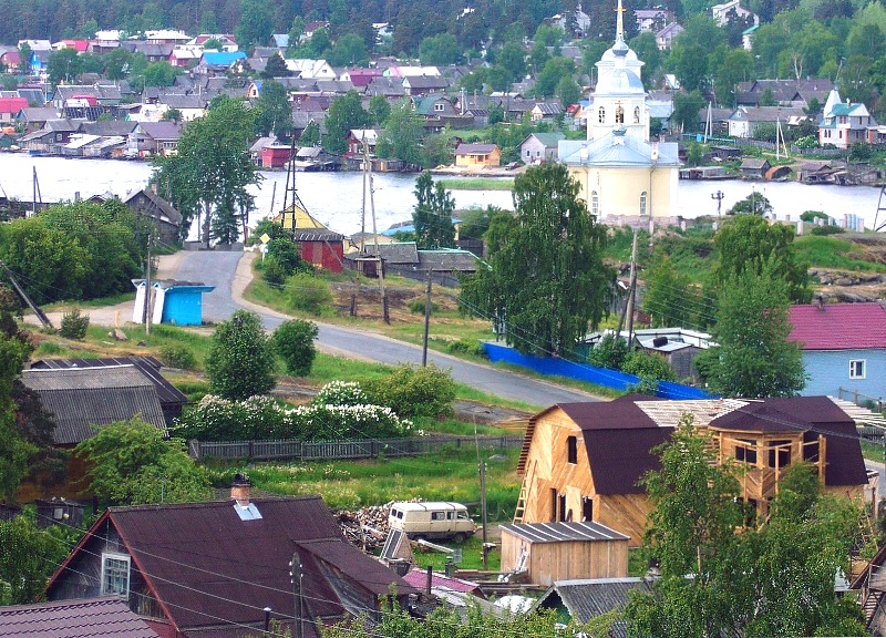 Церковь Сретения Господня в микрорайоне Соломенное, город Петрозаводск, вид в сторону Онежского озера. Церковь реставрируется. Фотография 2011 года.